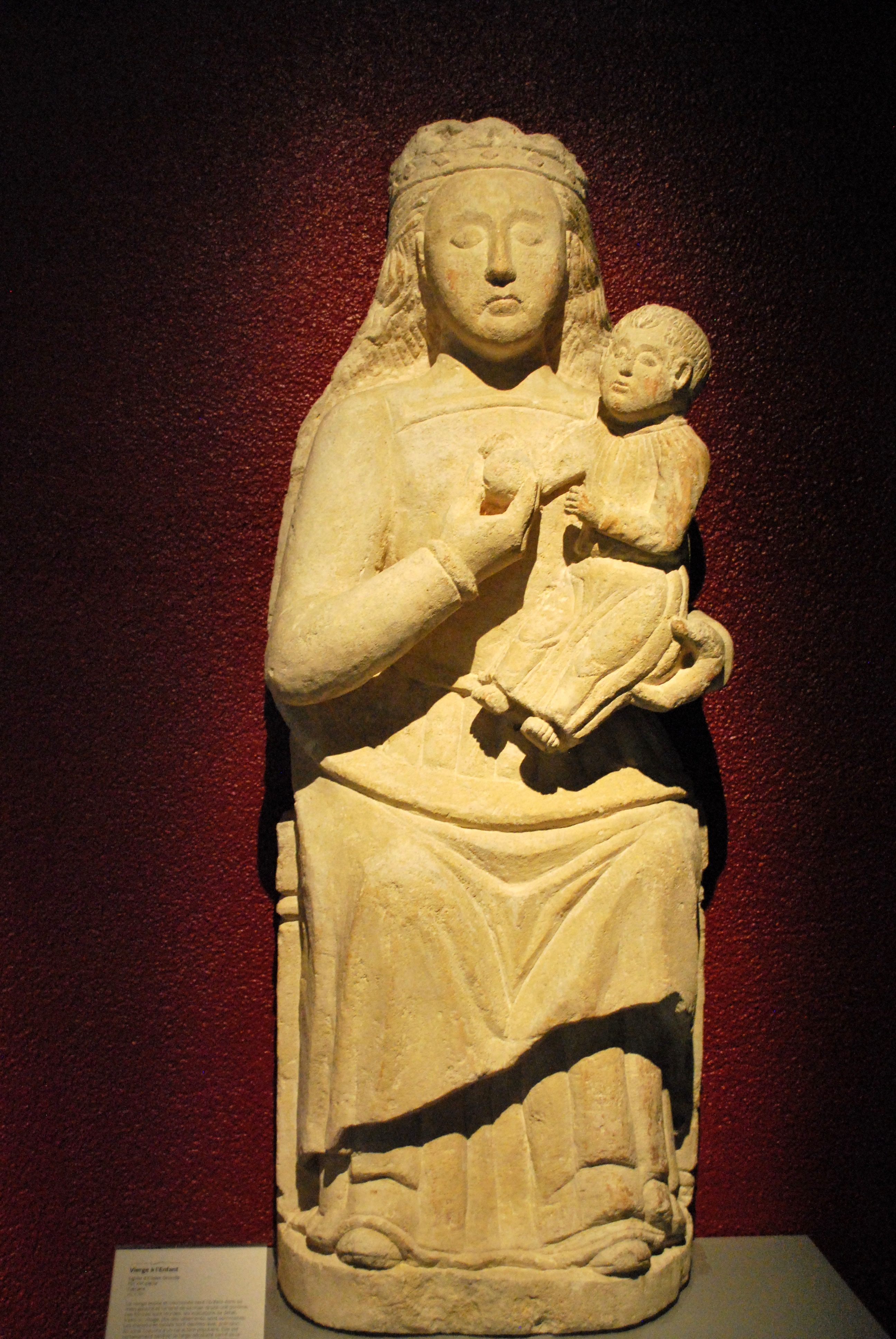 Musée d'Aquitaine Espiet Vierge à l'Enfant